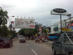 Kota Praya sebagai Pusat Kebudayaan Masyarakat Lombok Tengah.